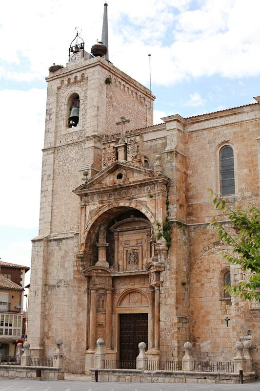 Iglesia Colegial de Santa María, en Roa (Burgos)